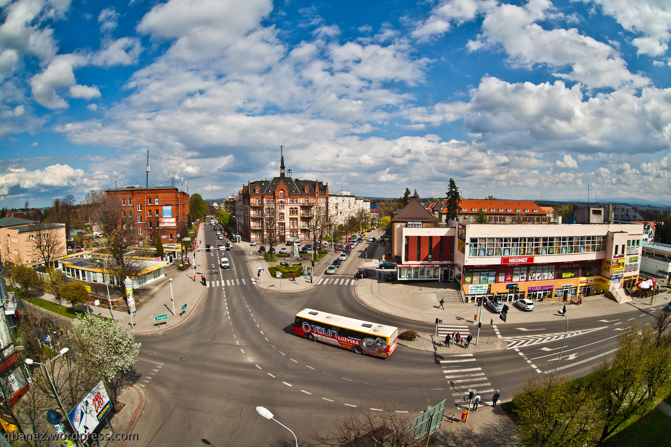 2012 wakacje